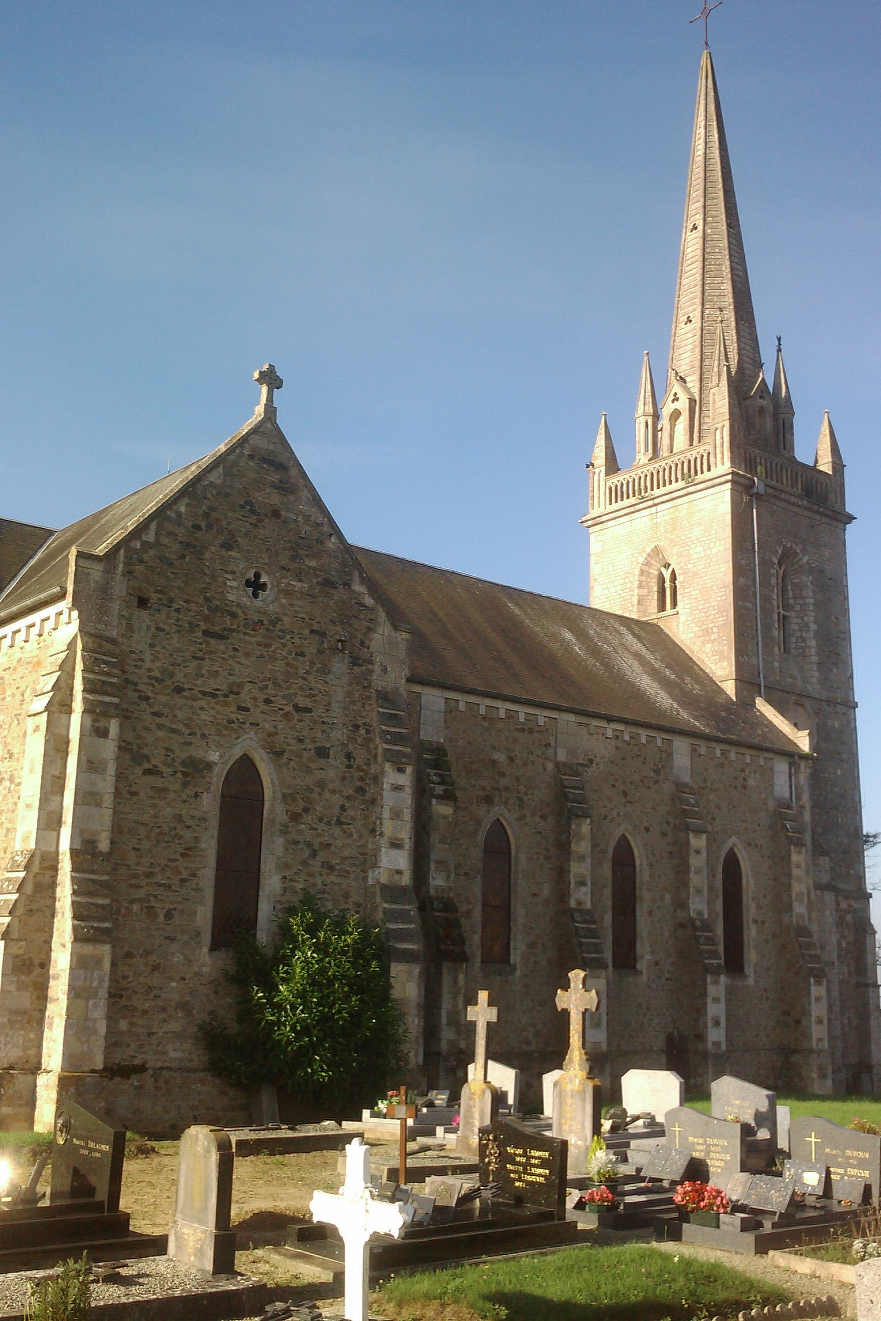 Église des Les Champs-de-Losque